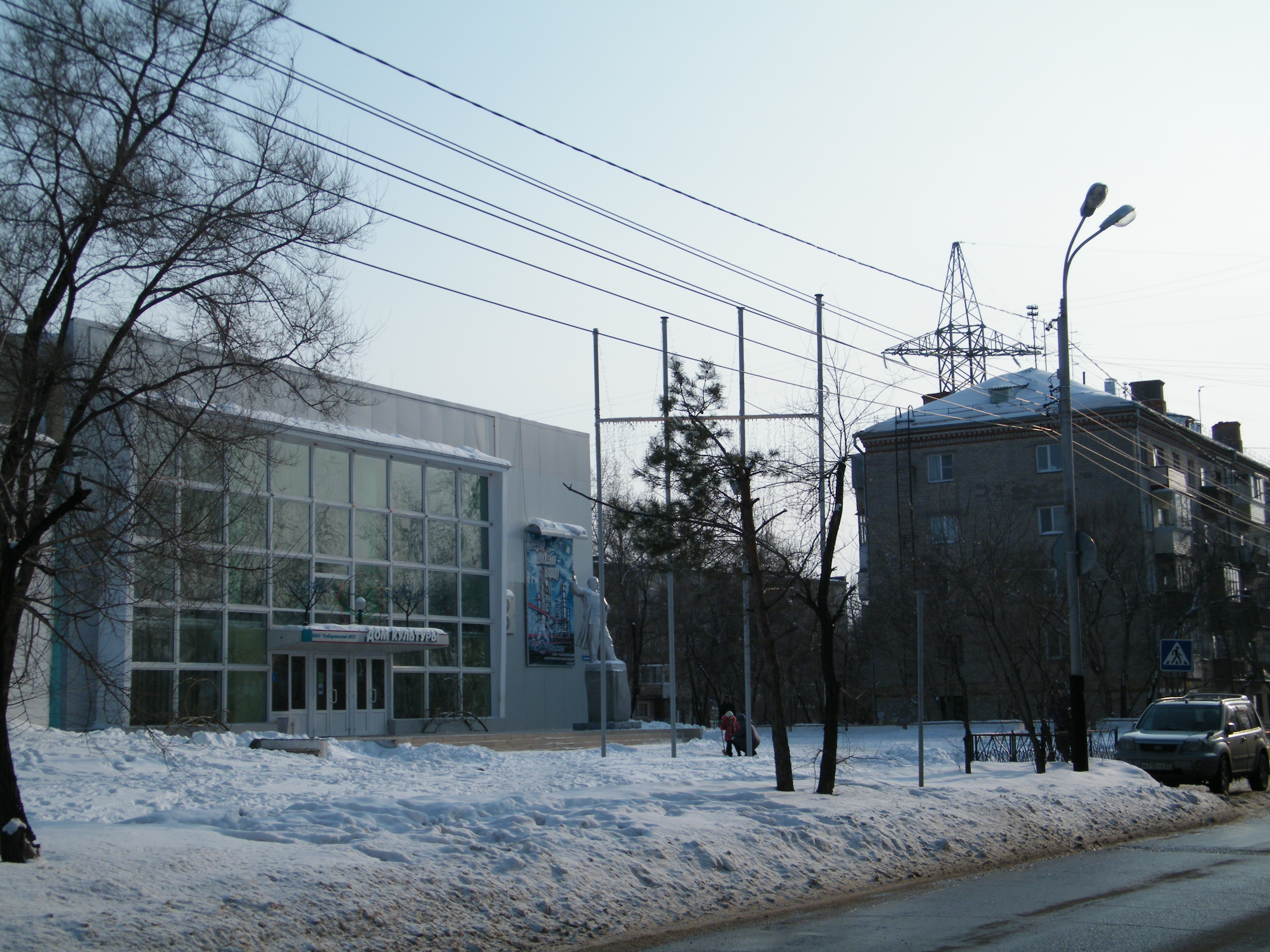 Хабаровск, дом культуры нефтеперерабатывающего завода